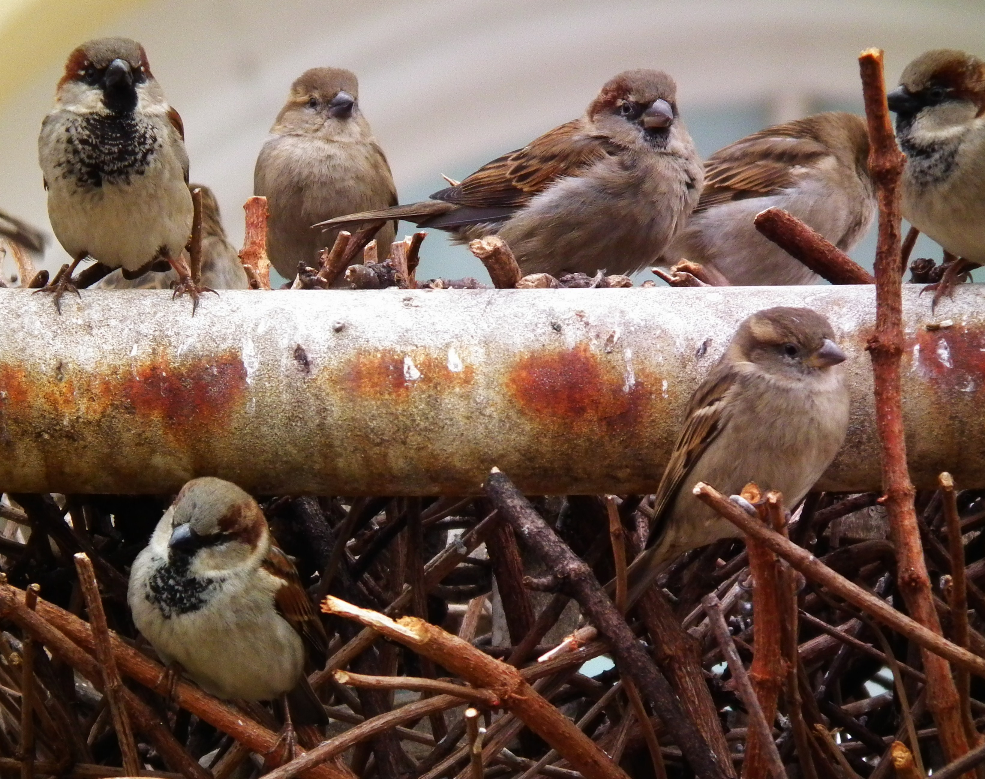 Spatzen (Passer domesticus) in der Karlsruher Innenstadt (Baden-Württemberg, Deutschland)